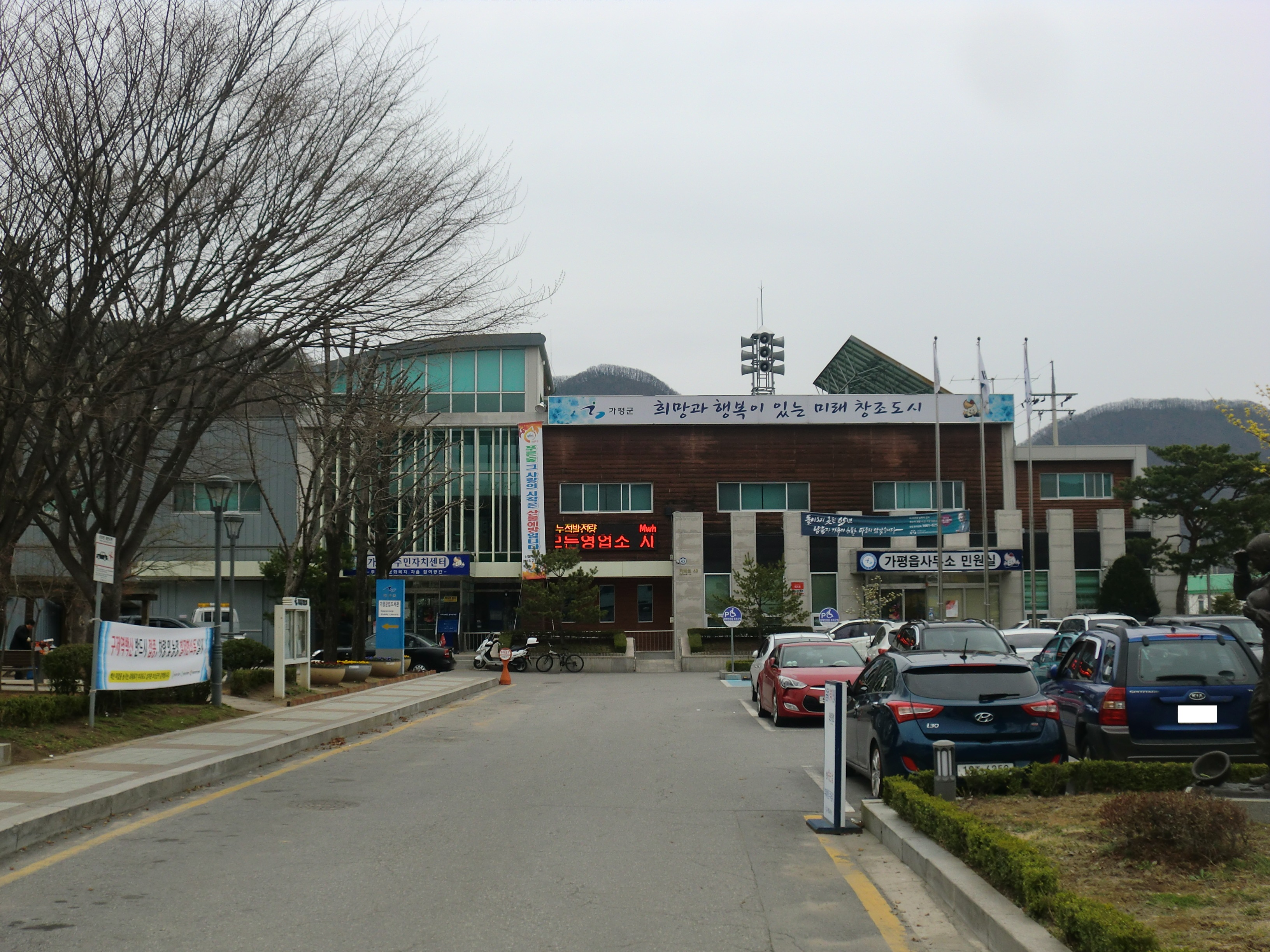 경기도 가평군에 있는 가평읍사무소